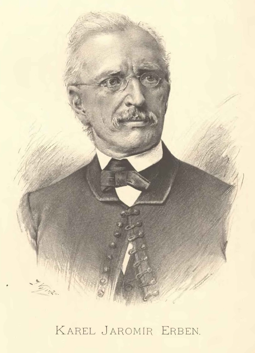 Portréty předních osobností od Jana Vilímka